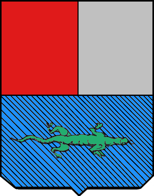 riproduzione